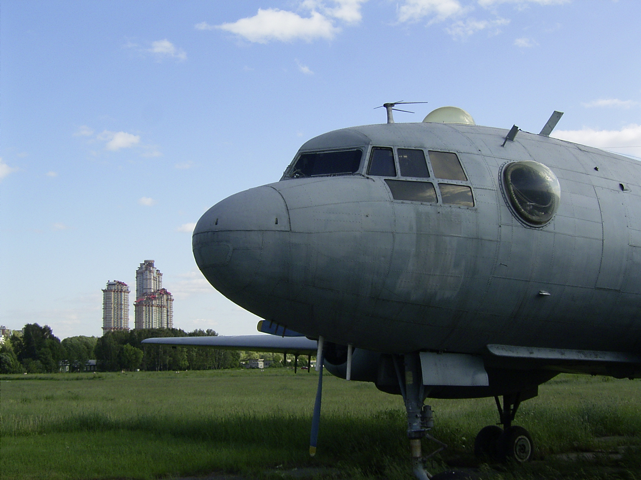 Ил-14 на фоне Алых парусов на Тушинском аэродроме